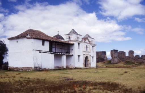 Capillas de Siecha (Guasca, Cund., Colombia) Esta foto fue tomada por mi persona, Hugo Zambrano, la misma persona que la subió a Wikipedia. No ha sido usada en otro lugar público. Declaró que la doy bajo la licencia GFDL.